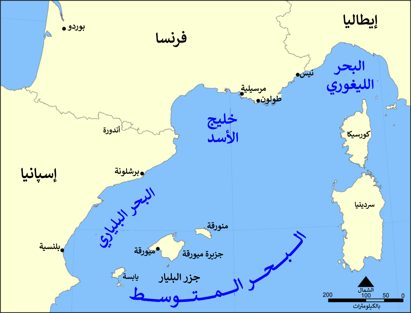 خريطة تُظهرُ موقع خليج الأسد قبالة سواحل فرنسا وإسپانيا.